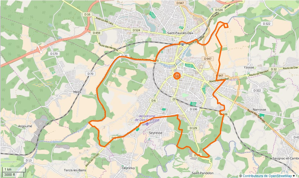 Dax (75879) Limite communale This map may be incomplete, and may contain errors. Don't rely solely on it for navigation.